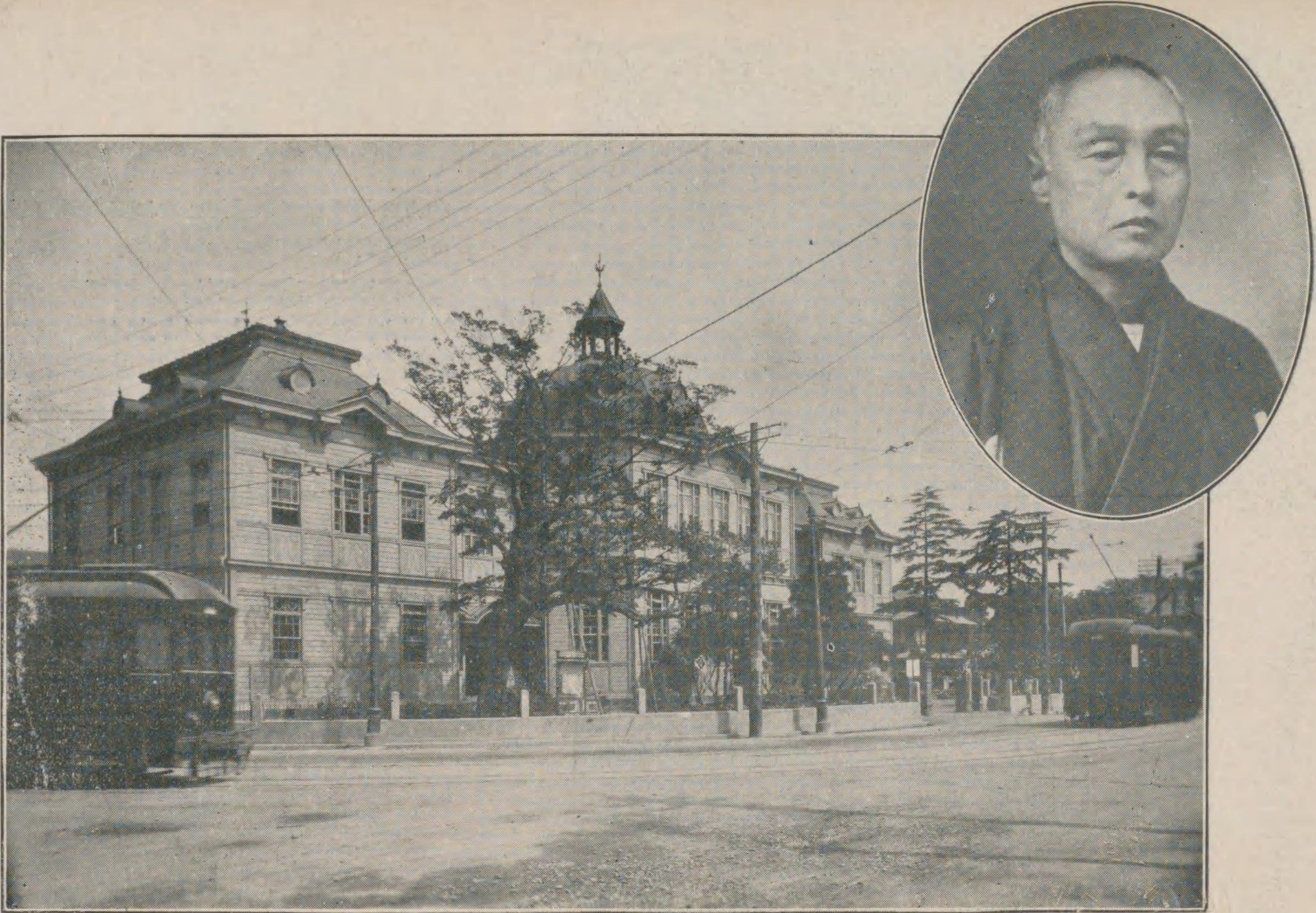 右上：斎藤善右衛門 58歳（明治44年） 左下：斎藤翁の寄附によりて成れる宮城県図書館（昭和3年写）